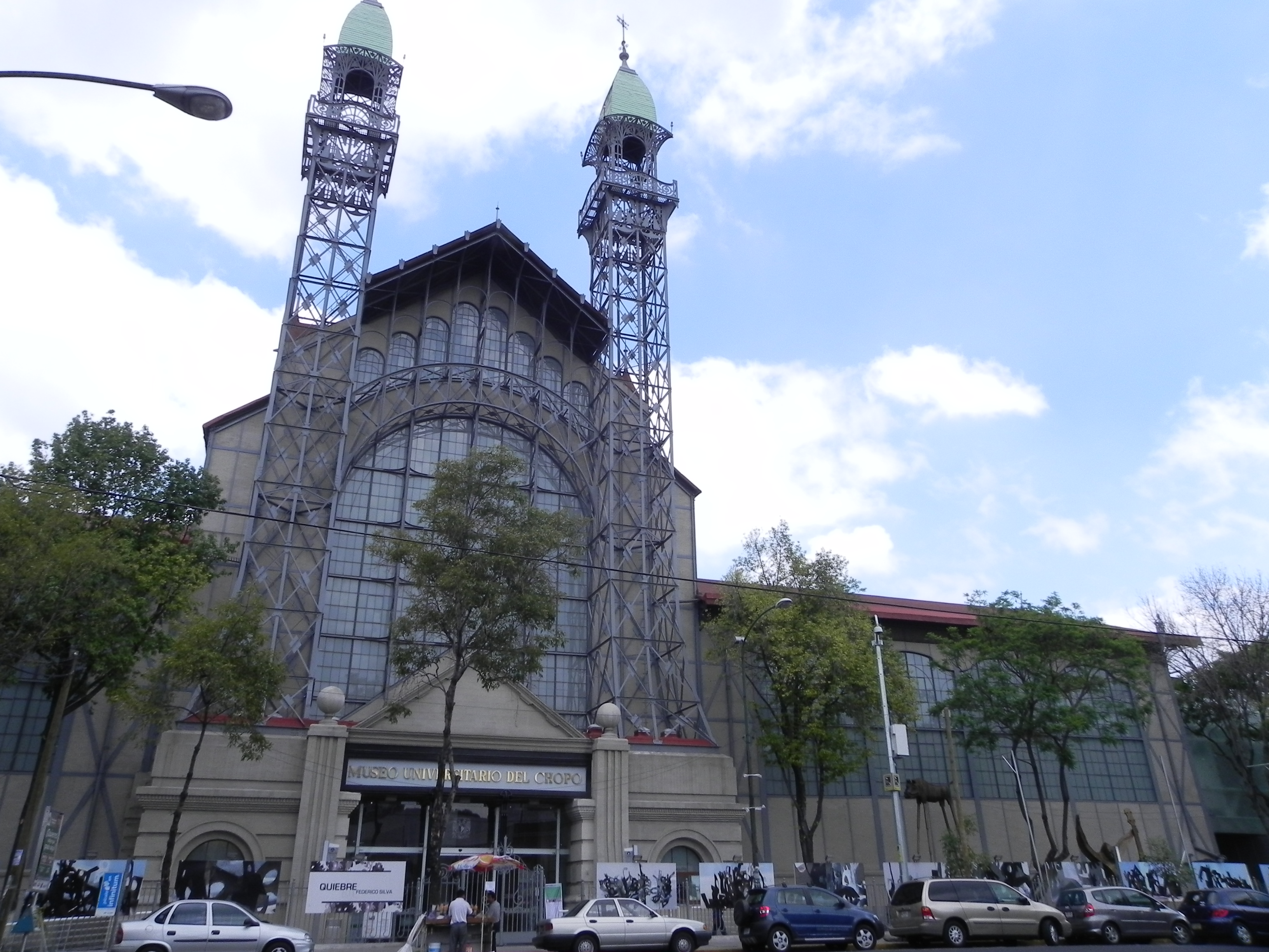 Museo Universitario del Chopo